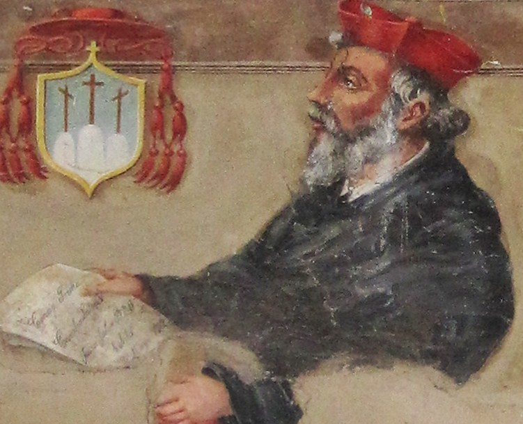 Egidio da Viterbo, affresco XVII sec., part., sala del cenacolo, convento Ss. Trinità Viterbo